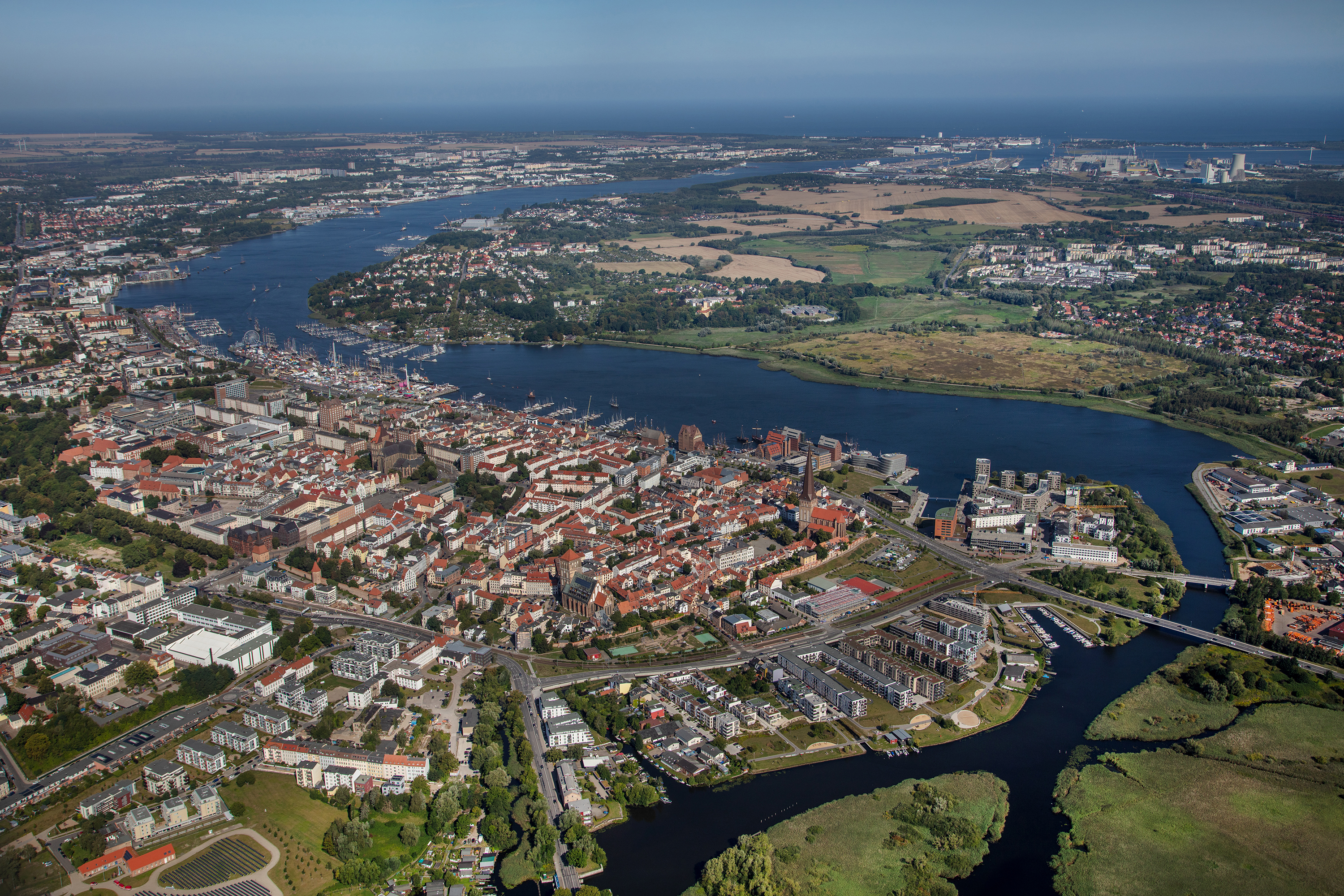 Luftbild Rostock mit Unterwarnow